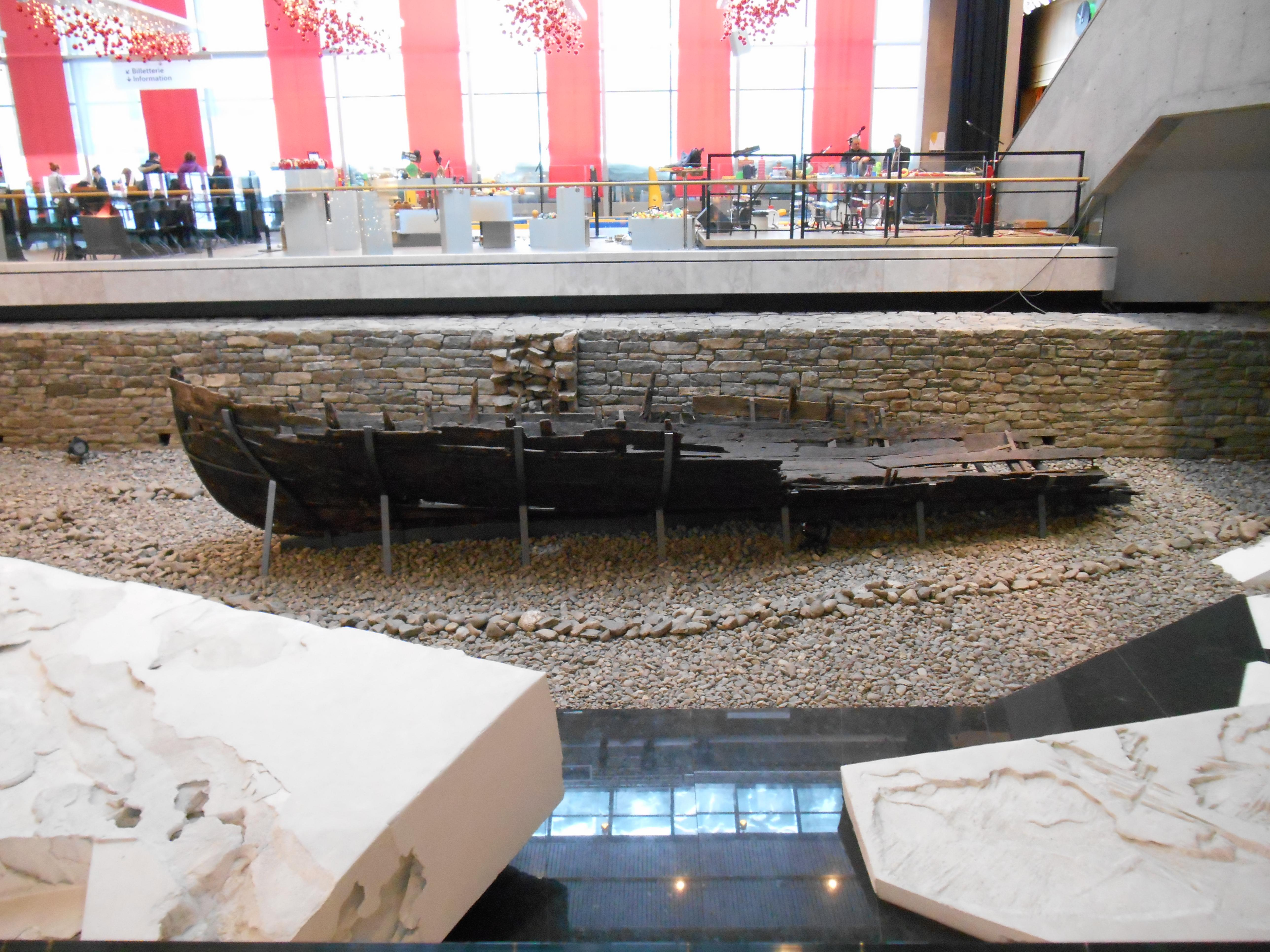 Vestige d'une barque, Musée de la civilisation, Québec